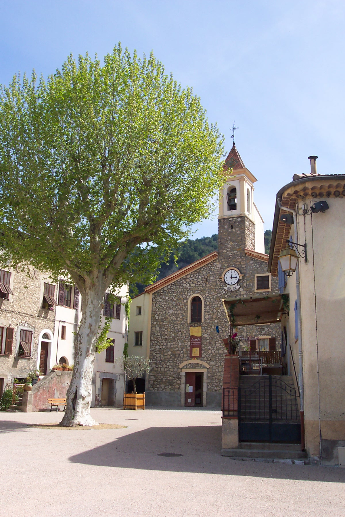 La place et l'église.